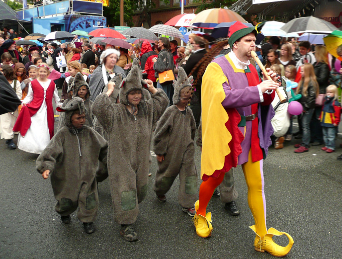 Rattenfängerauszug Hameln Tag der Niedersachsen 21.6.